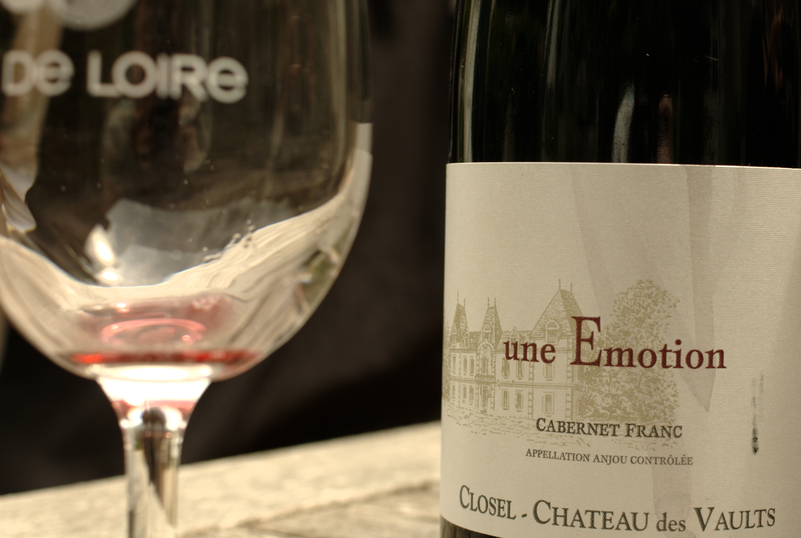 Verre et bouteille d'Anjou AOC